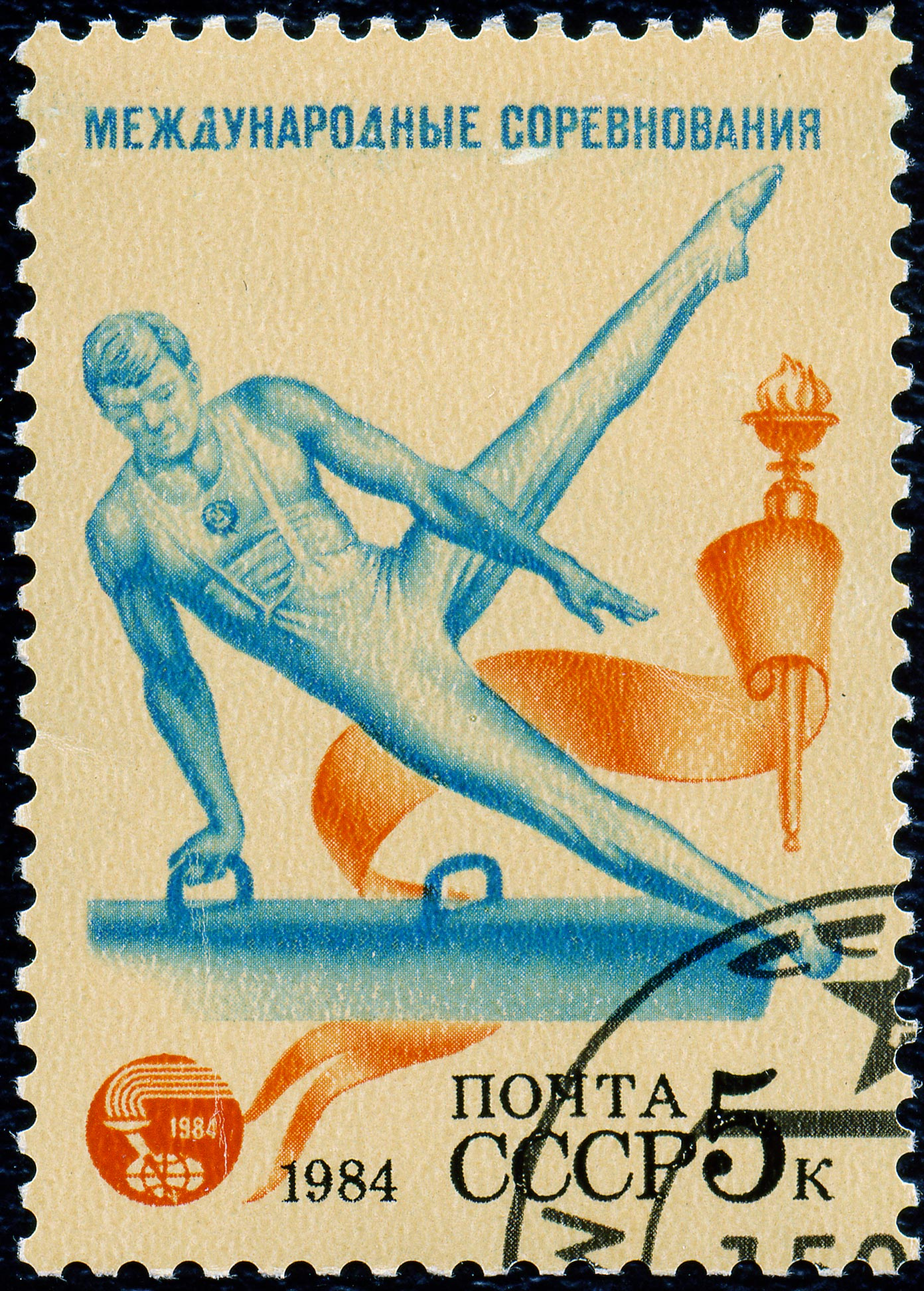 Почтовая марка СССР. 1984. Международные соревнования «Дружба-84». Спортивная гимнастика